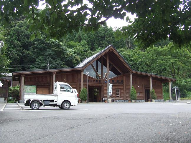 JR青郷駅駅舎